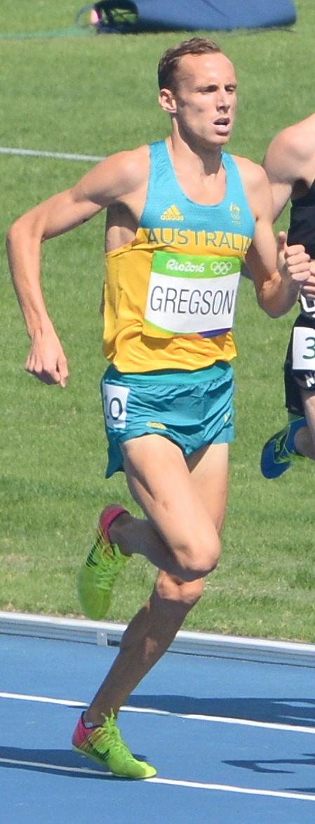 Ryan Gregson dans sa série du 1500m des JO de Rio 2016